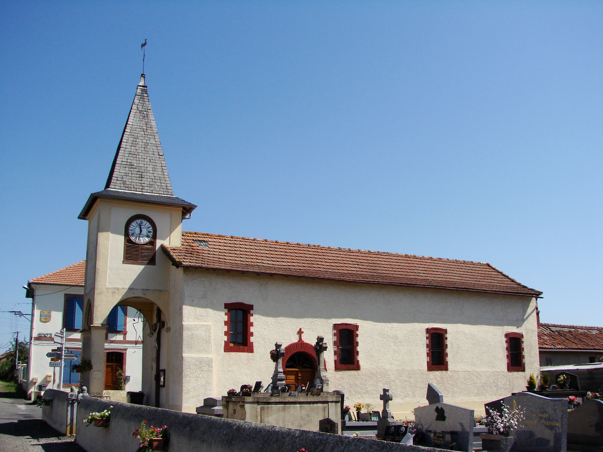 Vue du village de Sabalos dans les Hautes-Pyrénées (France) : église et cimetière coté sud